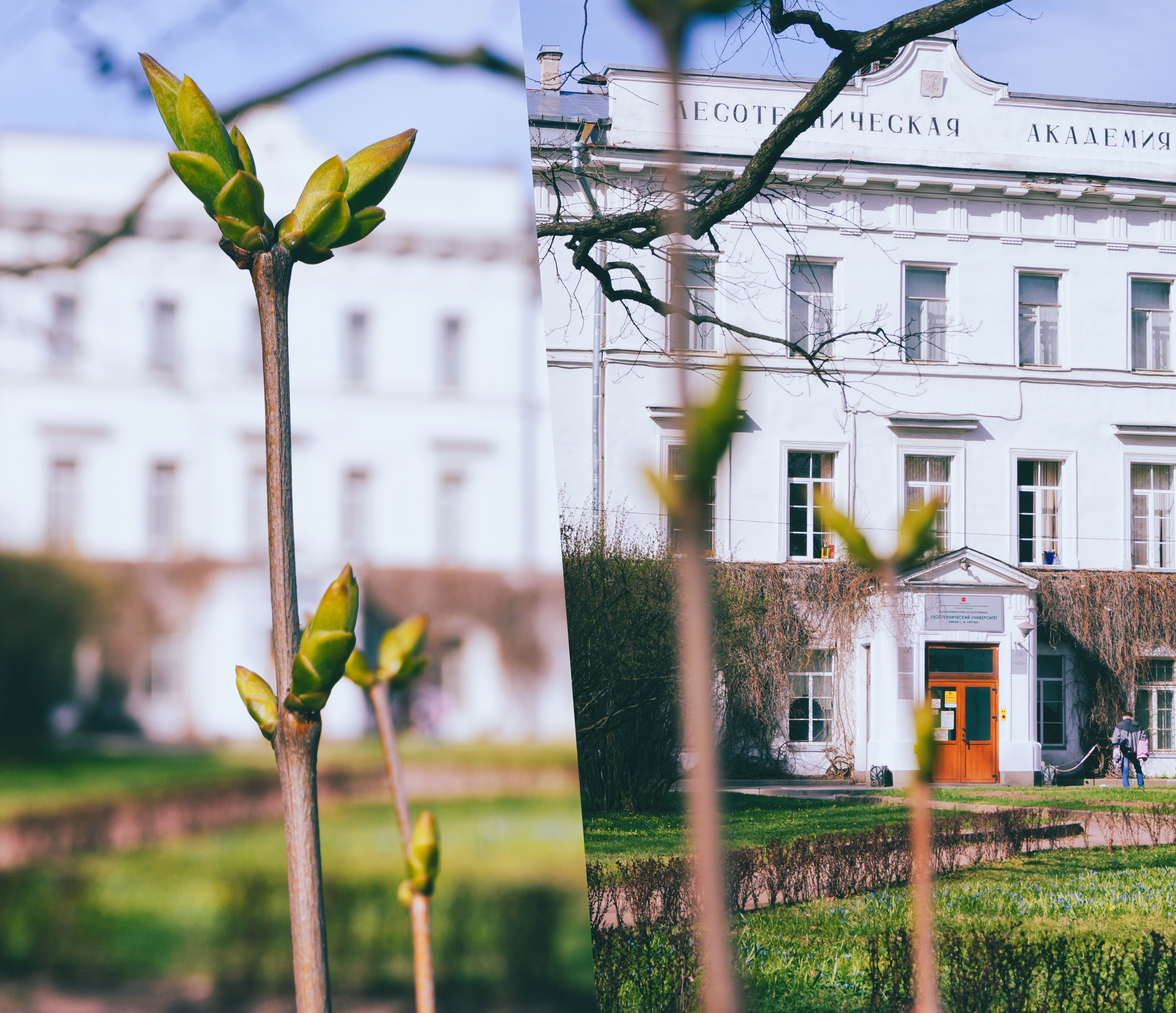 Весна в СПбГЛТУ